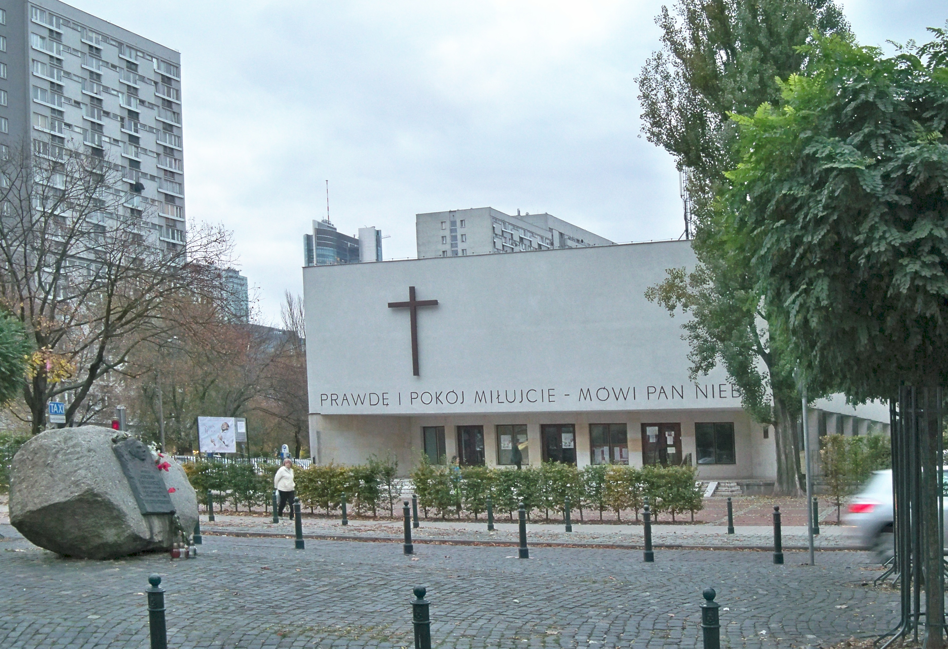 Ulica Chłodna w Warszawie, pobliże Żelaznej. Kaplica Baptystów i pomnik Jerzego Popiełuszki.